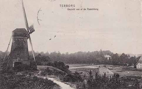 De Terborgsche Molen; reeds verdwenen molen op de Paasberg te Terborg